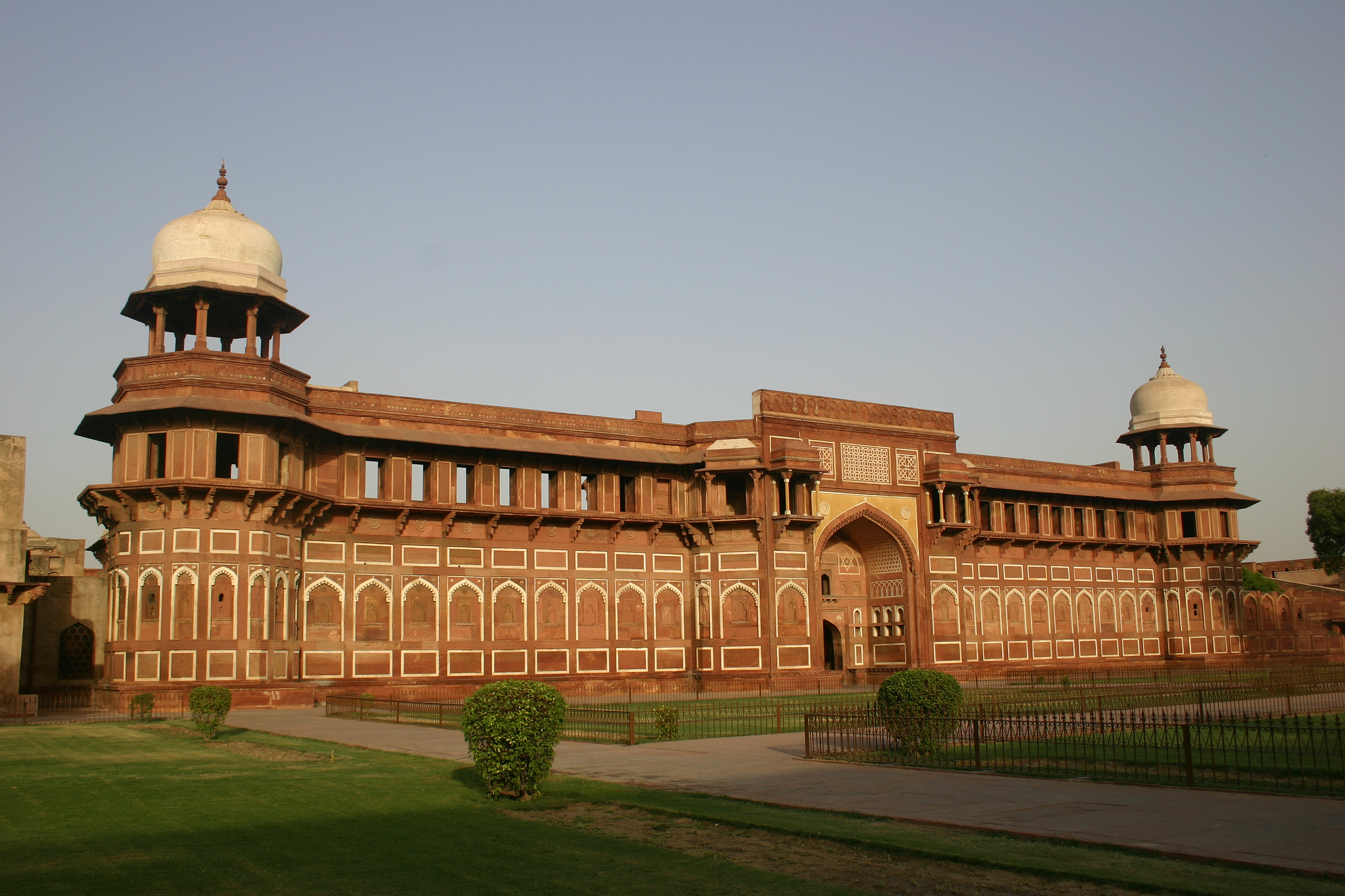 India, "Incredible India"